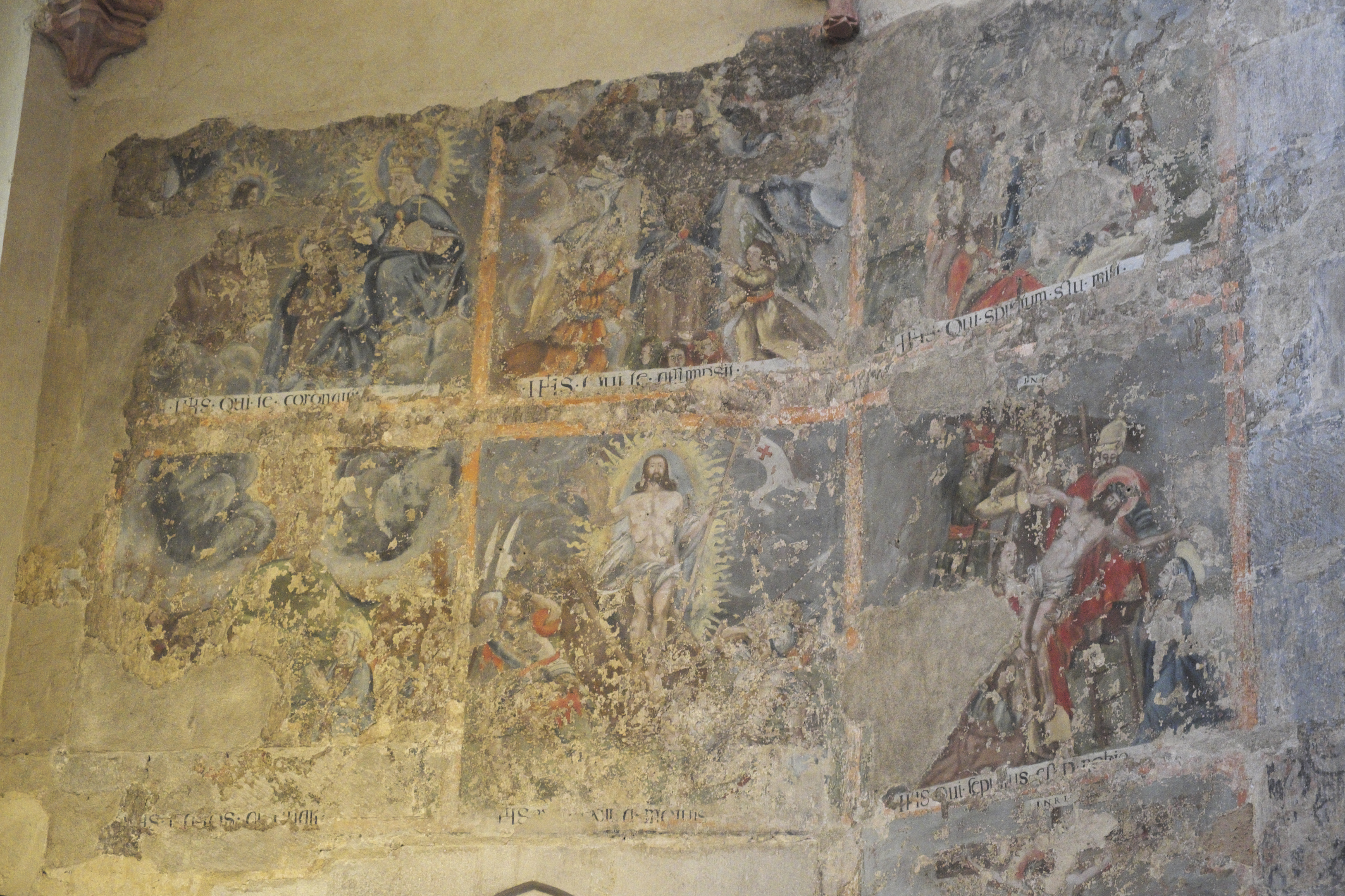 Katholische Pfarrkirche Notre-Dame in Vitré im Département Ille-et-Vilaine (Region Bretagne/Frankreich), Wandmalerei